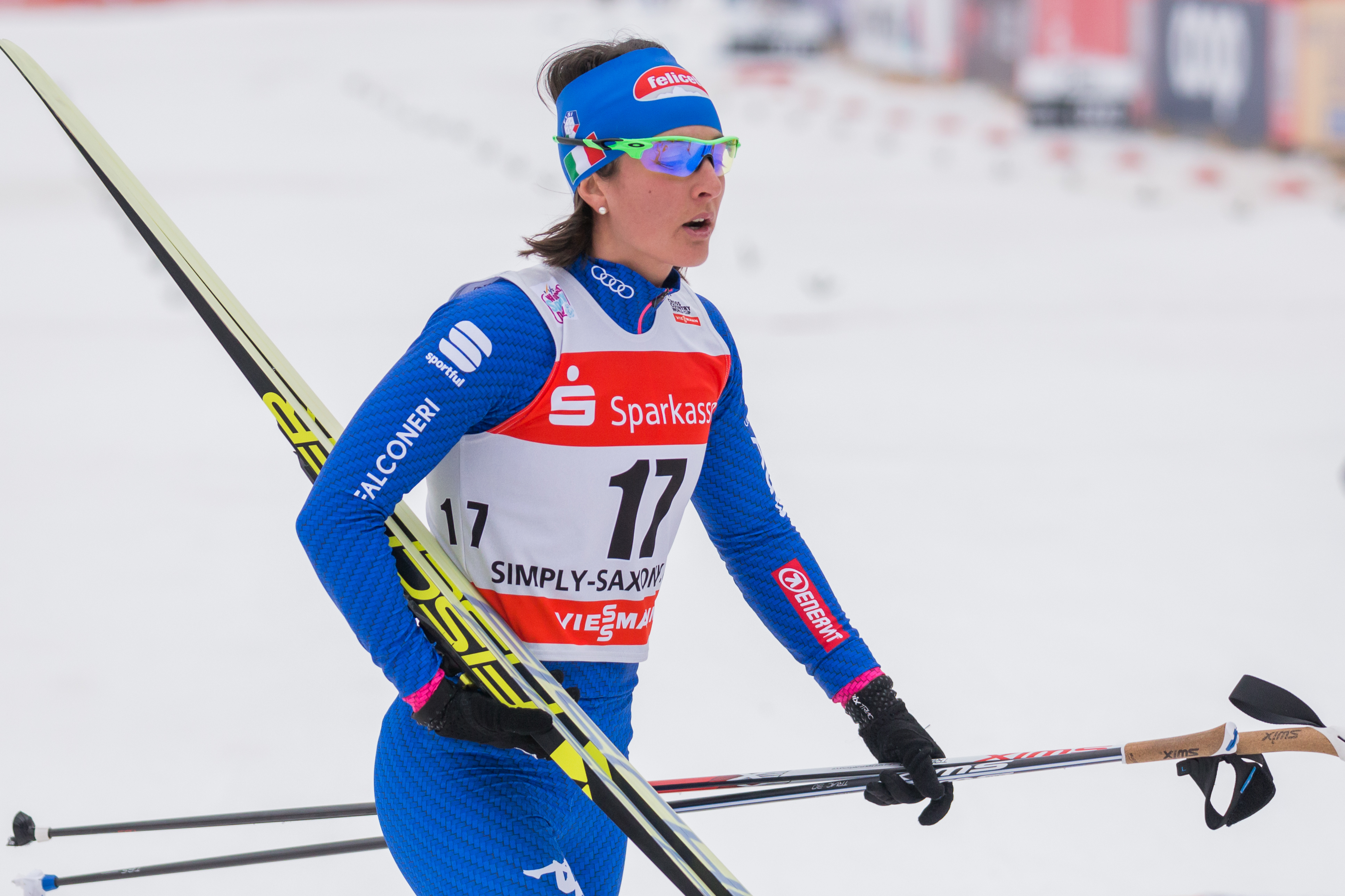 Gaia Vuerich (ITA, Italien)